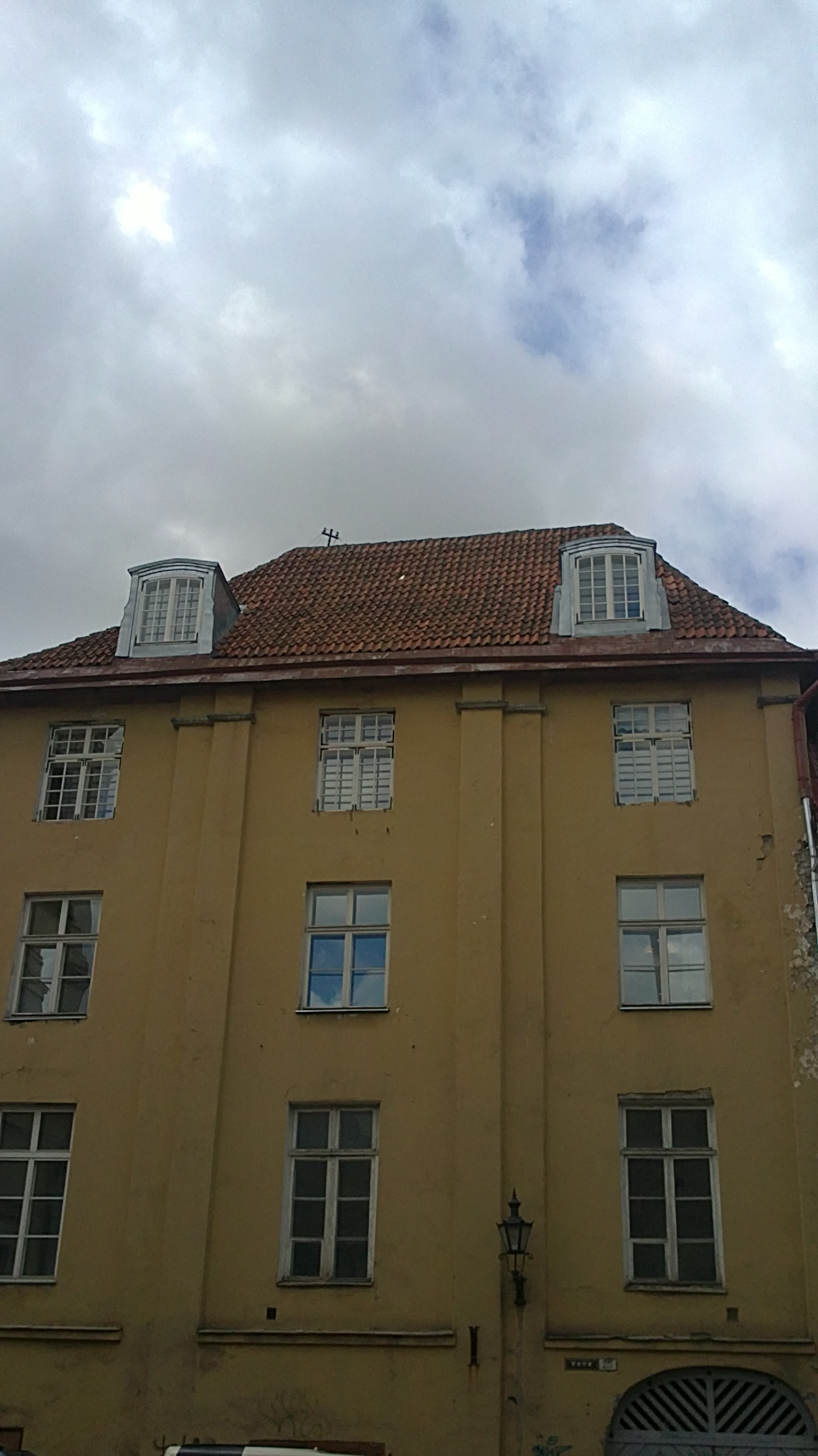 Tallinna vanalinnas, Vene tänav 25 hoone, endine Vene tänava eeluurimisvangla